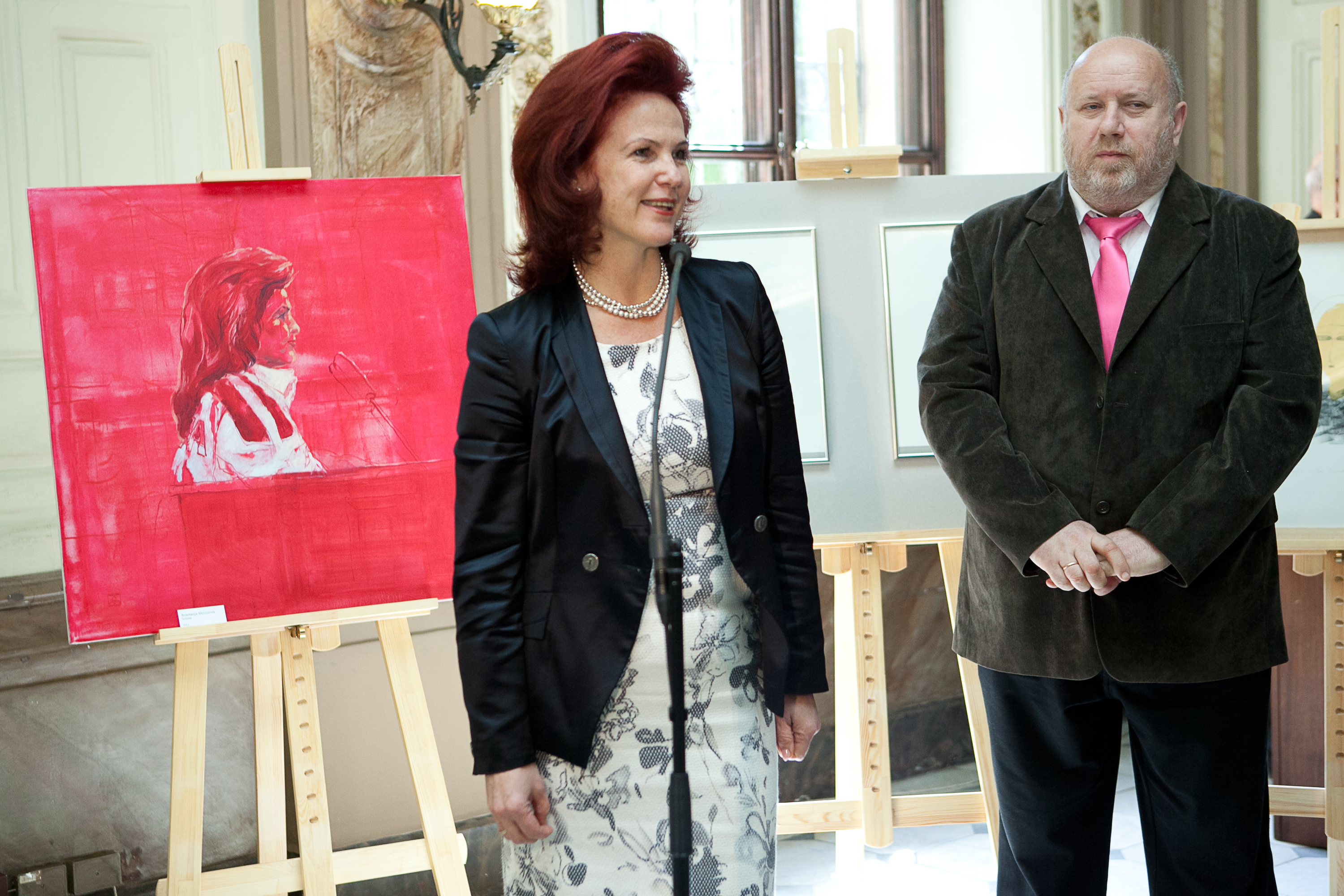 2012.gada 31.maijs. Projekta „Portretu darbnīca 2012. Latvijas Mākslas akadēmijas Grafikas nodaļas studenti Saeimā” izstādes atklāšana. Saeimas priekšēdētāja Solvita Āboltiņa un LMA rektors Aleksejs Naumovs. Foto: Ernests Dinka, Saeimas Kanceleja